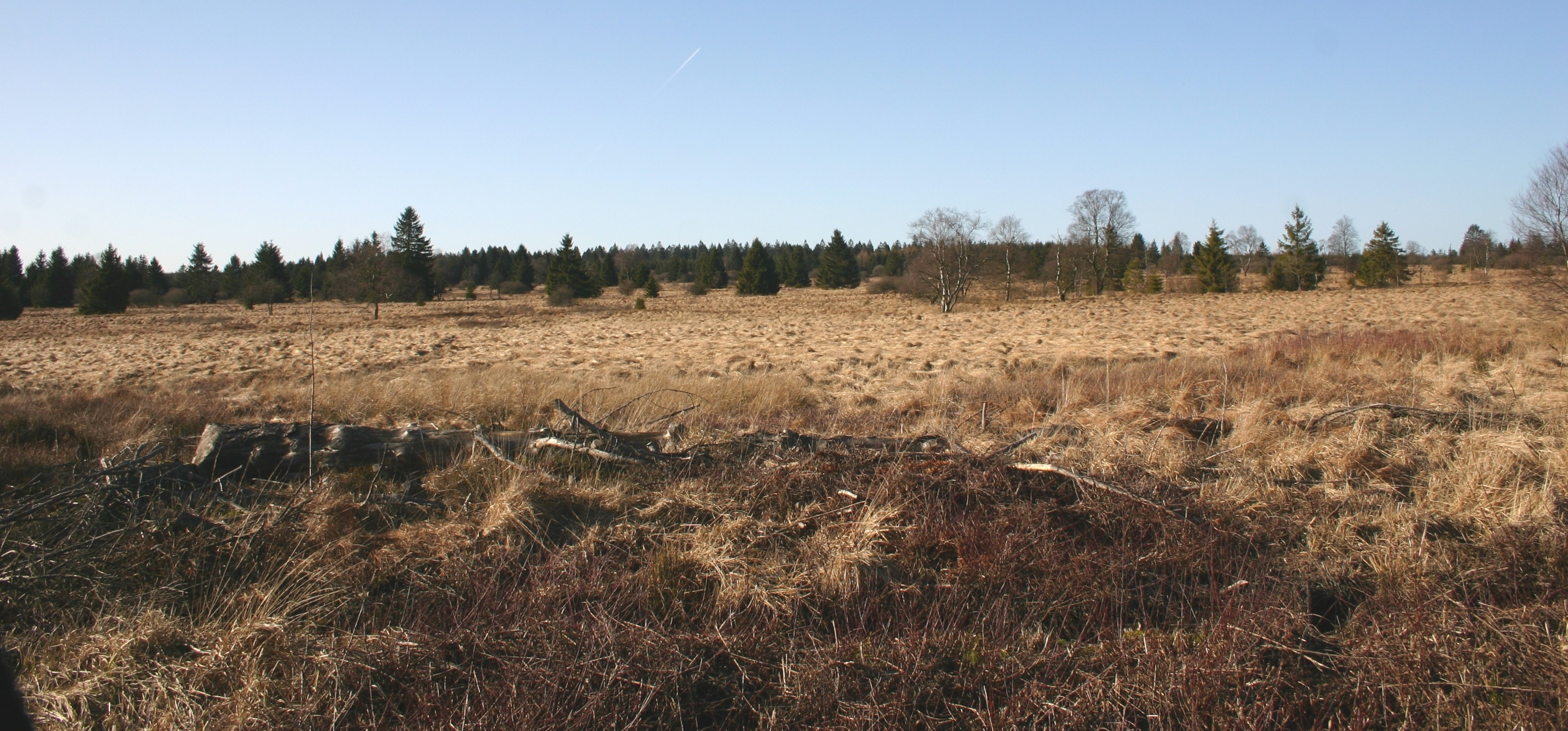 Fagne de Setay Wanter Febuar 2008.